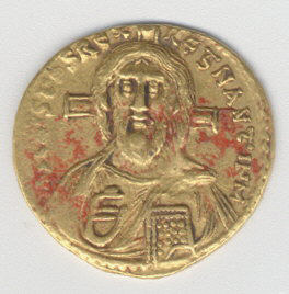 Byzantine; Solidus; Coins